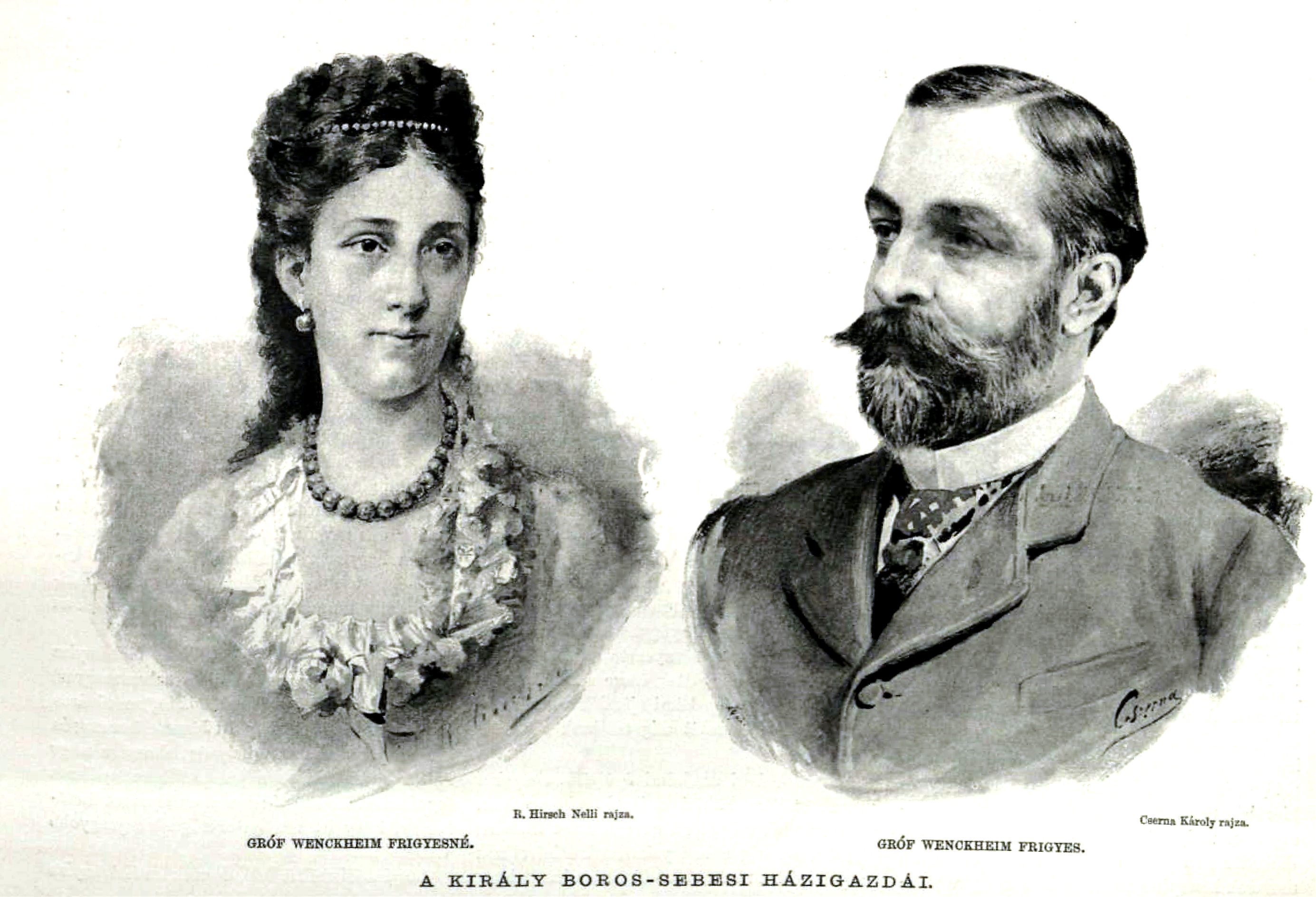 gróf Wenckheim Frigyesné és gróf Wenckheim Frigyes A KIRÁLY BOROS-SEBESI HÁZIGAZDÁI.Portrait drawings by Nelli Hirsch and Károly Cserna